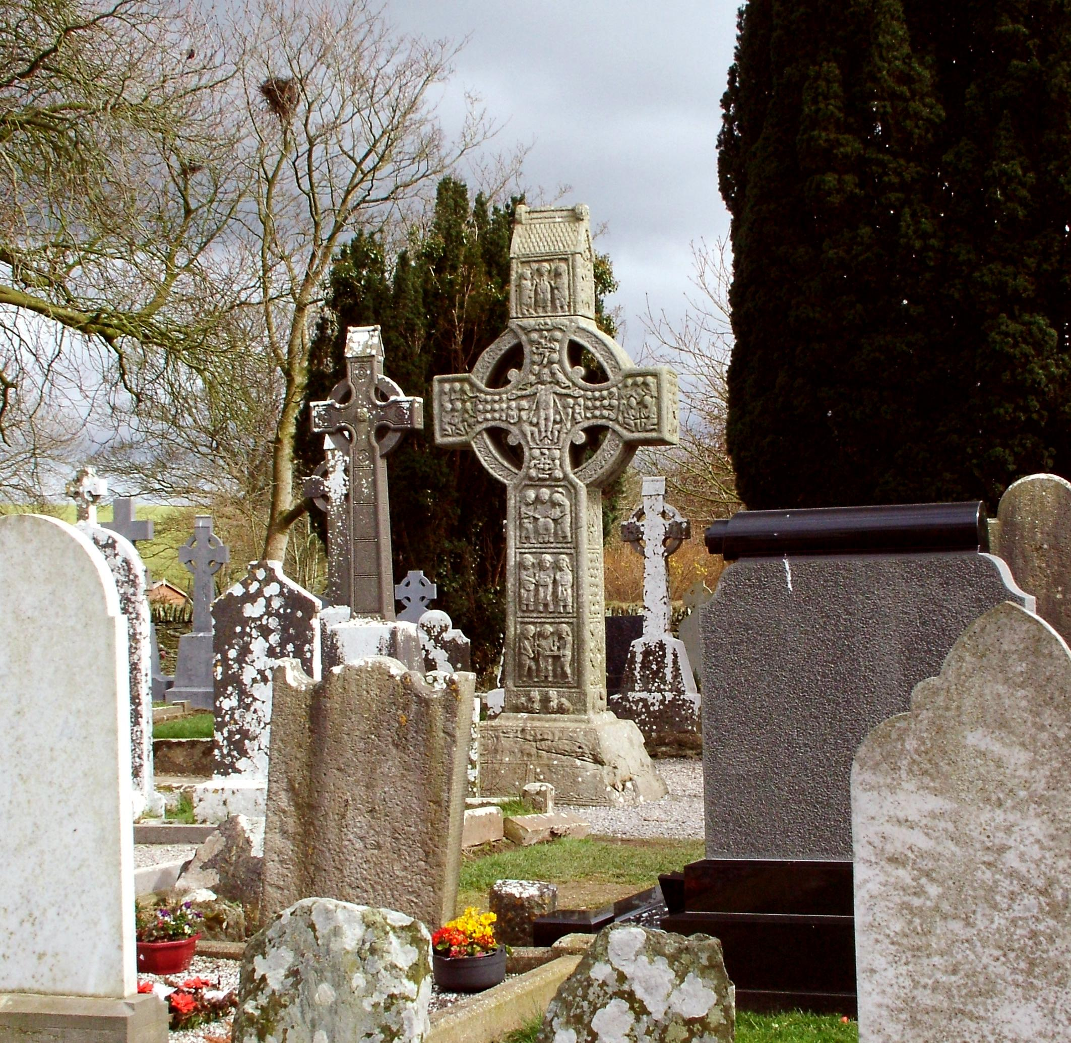 Kelta nagykeresztek csoportja a temetőkertben (Monasterboice, Írország)